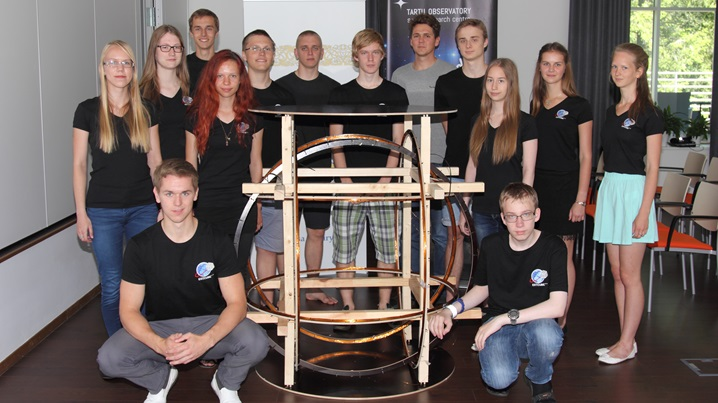 2015. aasta suvel Teadusmalevas osalenud õpilased koos ehitatud Helmholtz'i pooliga.